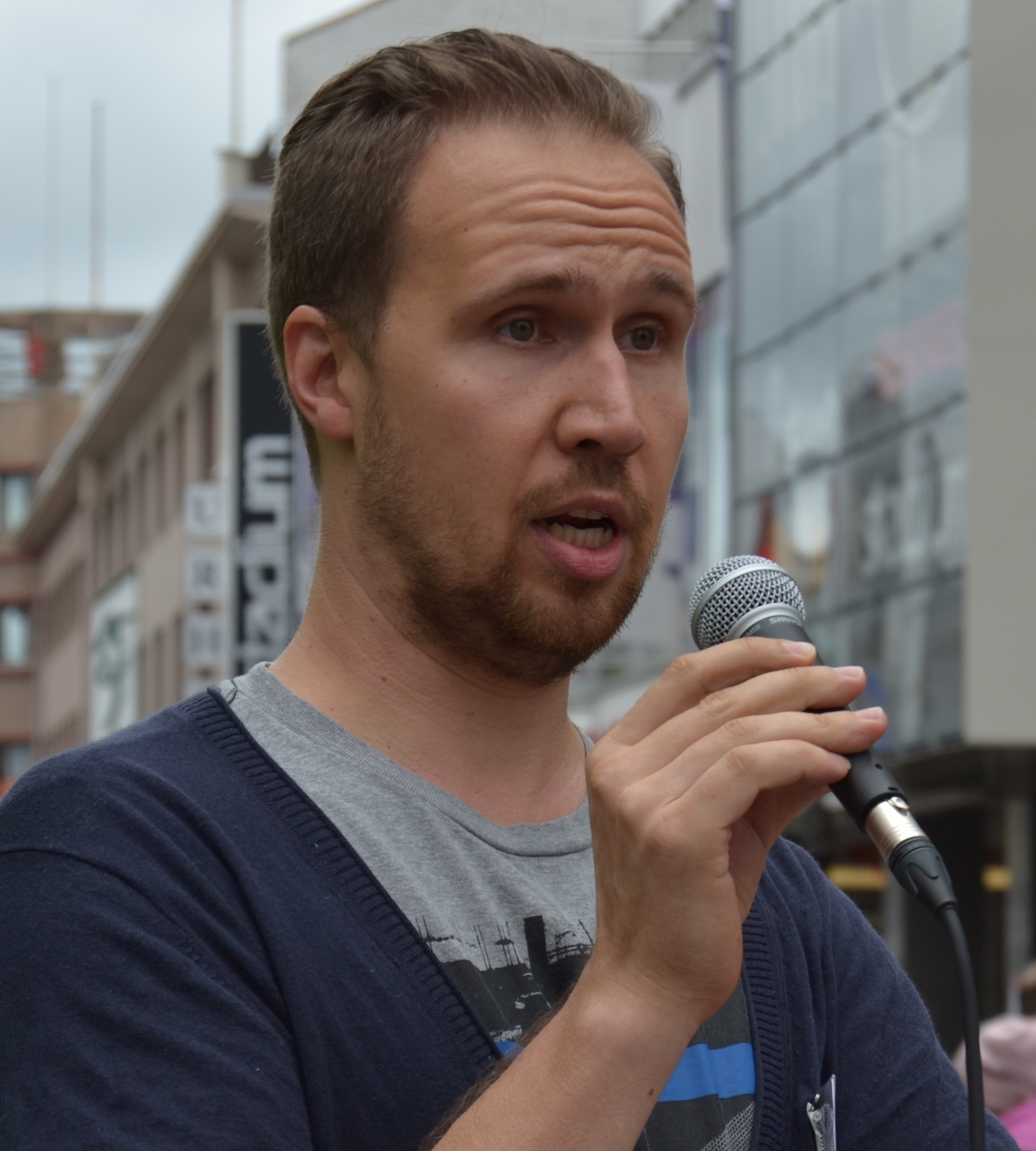 Touko Aalto elokuussa 2011